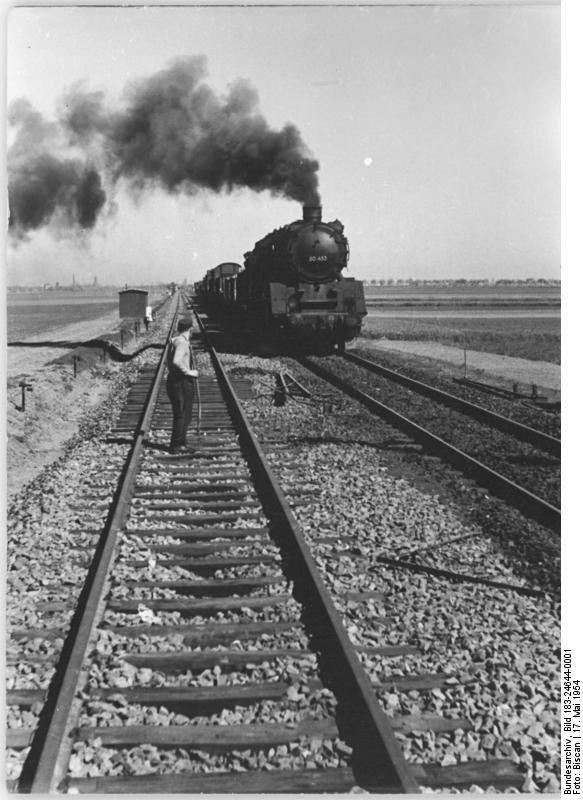 Anfahrt einer Dampflok 50 453 (BR 50) Zentralbild Biscan Ra-Krz. 17.5.1954 Strecke Magdeburg-Halle zum Teil schon zweigleisig. Als eine der ersten Bahnstrecken in der Deutschen Demokratischen Republik wird auf der Strecke Magdeburg-Halle noch in diesem Jahr das zweite Gleis gelegt. Zwei Abschnitte sind fertig und werden am 23. Mai mit Beginn des Sommerfahrplanes in Betrieb genommen: die Teilstrecken Köthen-Stumsdorf, 12 km lang und Niemberg-Halle, 9 km lang. Das Schienenmaterial lieferte die Sowjetunion und die Schwellen Rumänien. Wie Walter Ulbricht in seinem Rechenschaftsbericht auf dem IV. Parteitag der Sozialistischen Einheitspartei bekanntgab, hatte die Reichsbahn schon bis Ende vorigen Jahres ihren Plan im Gleisneubau innerhalb des Fünfjahrplanes erfüllt. Bei der Verlegung des zweiten Gleises auf der Strecke Magdeburg-Halle handelt es sich um ein über den Fünfjahrplan hinausgehendes Bauvorhaben. UBz: Zwischen Köthen und Stumsdorf der Strecke Magdeburg-Halle werden am Sonntag, dem 23. Mai, erstmalig die Züge auf dem 2. Gleis dahinbrausen.